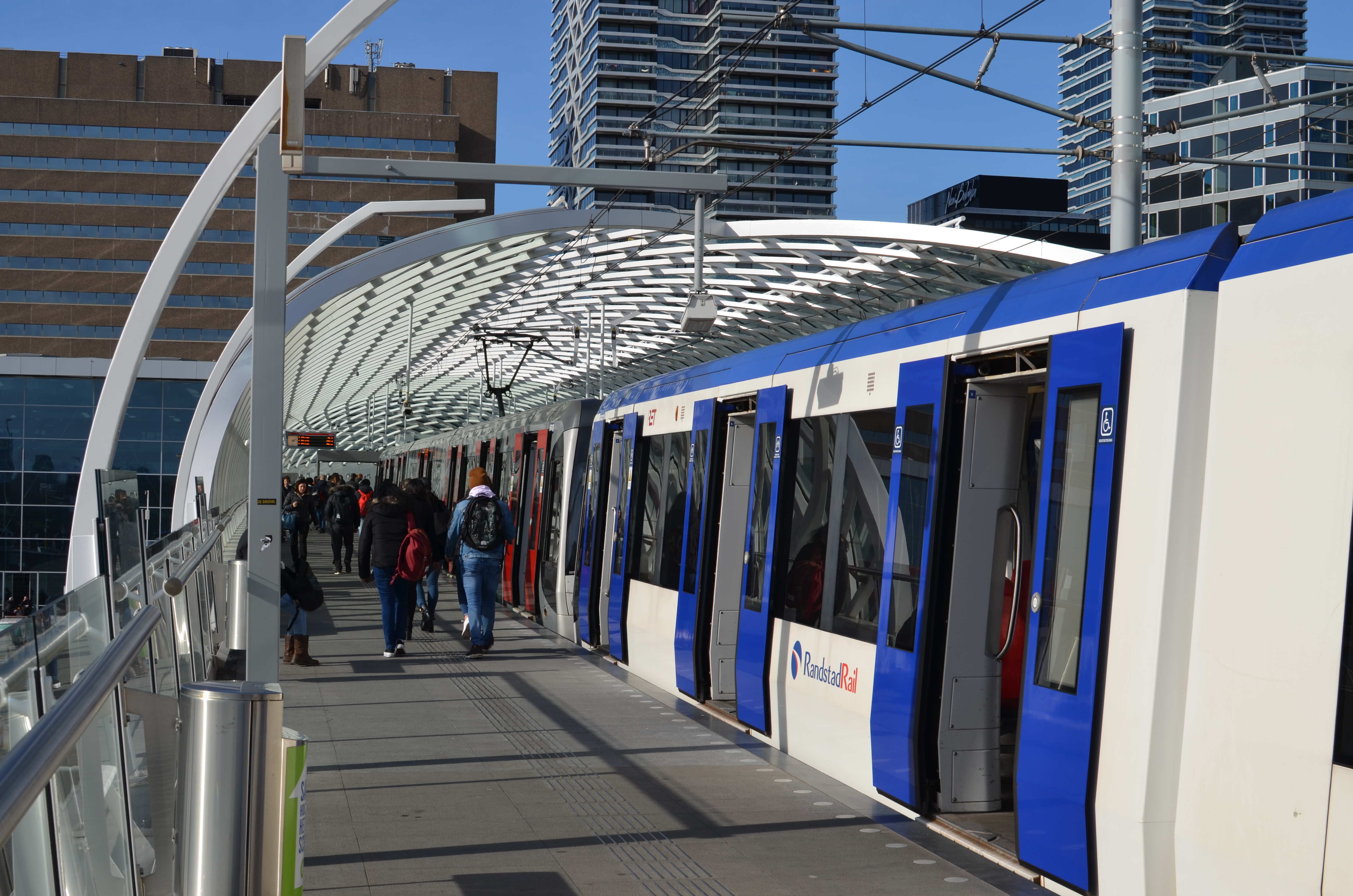 Een Randstadrailvoertuig op station Den Haag Centraal.